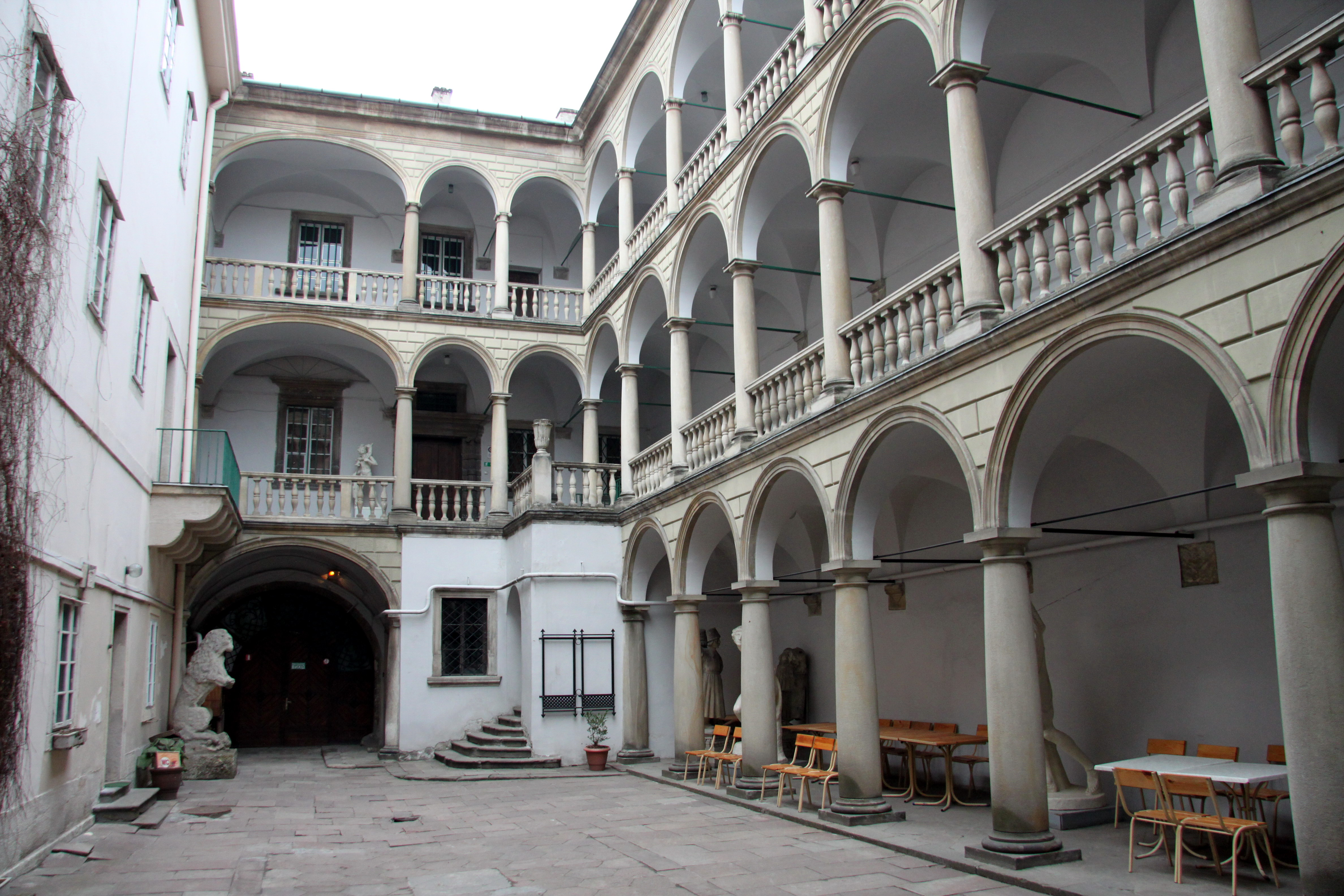 музей історичний (Кам'яниця Мешковського), Львів, Ринок пл., 6